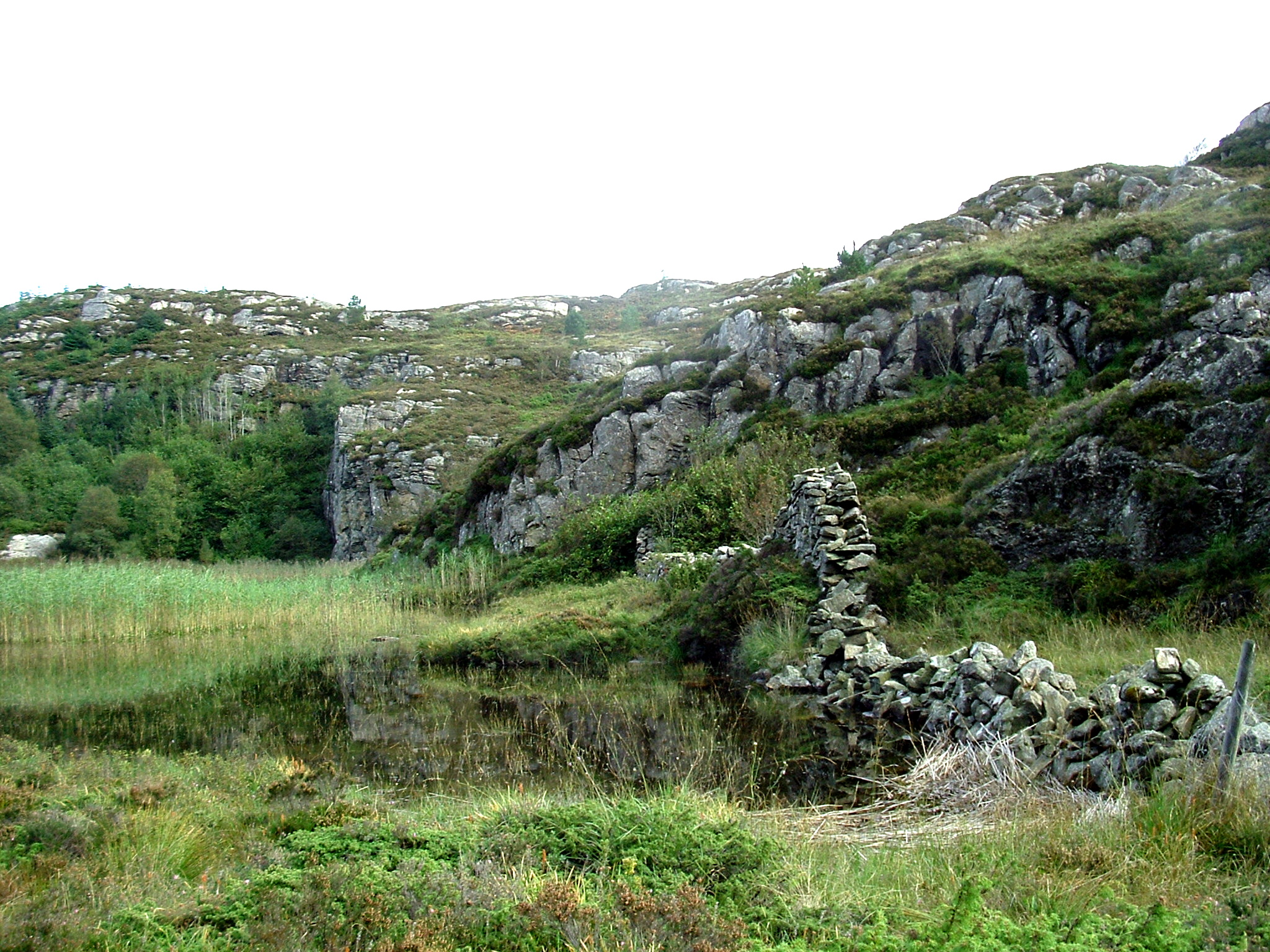 Eget foto